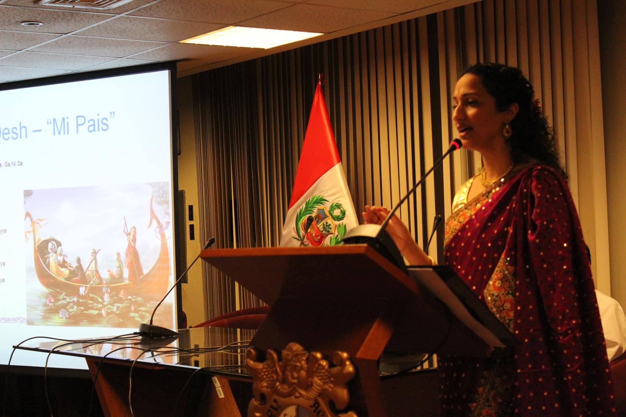 Evento Grupo Asia (11)